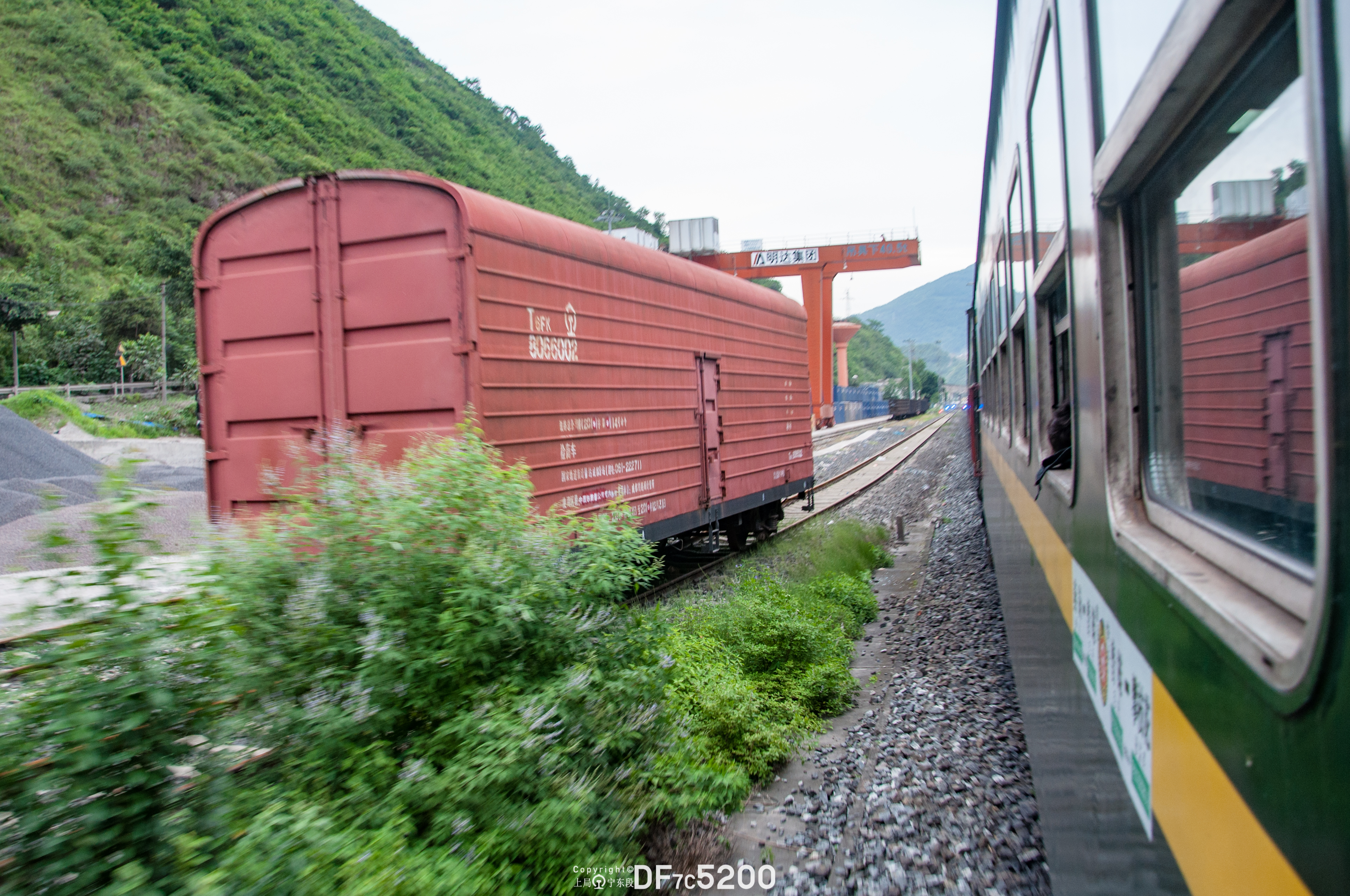 中文（中国大陆）: 中国铁路T6FK型砝码检衡车